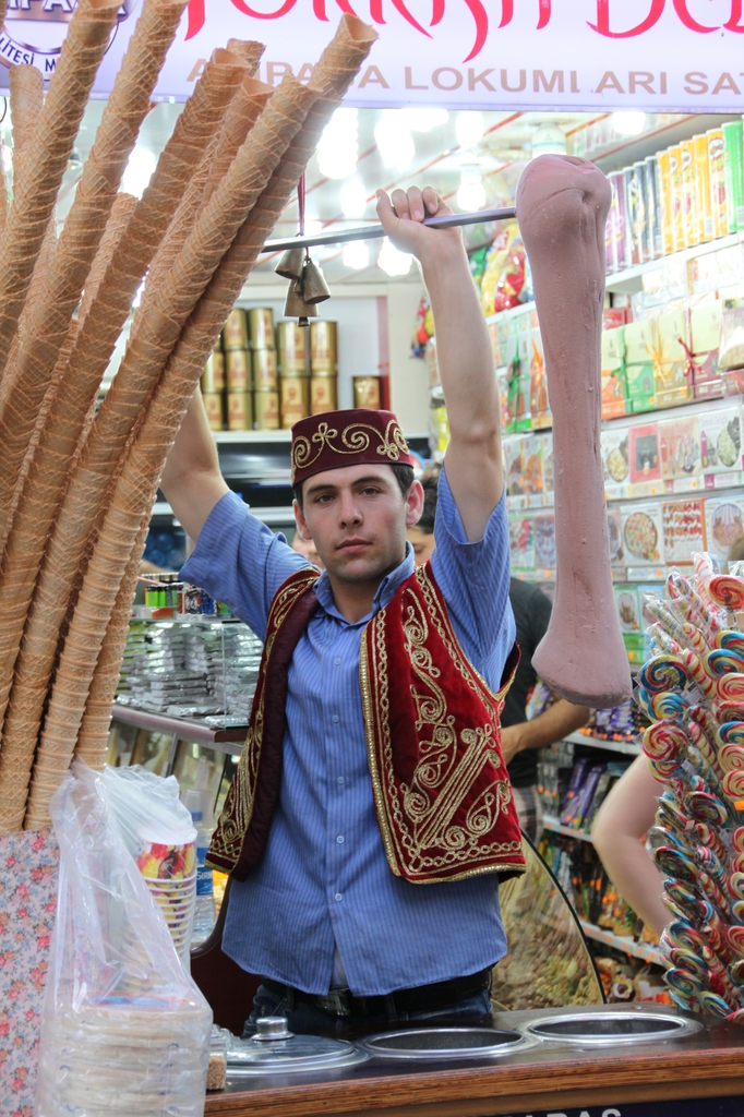 A guy serving "maraş dondurması" at Beyoğlu, Istanbul Dondurma [Larger Image Exists]